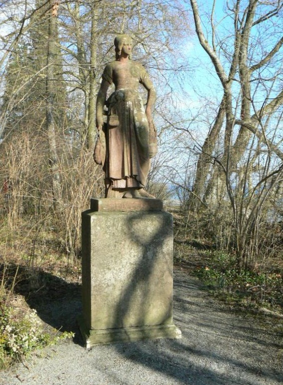 Statue der Fischerin vom Bodensee auf der Insel Mainau